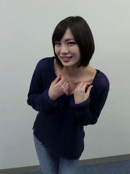 鈴村あいり2015年